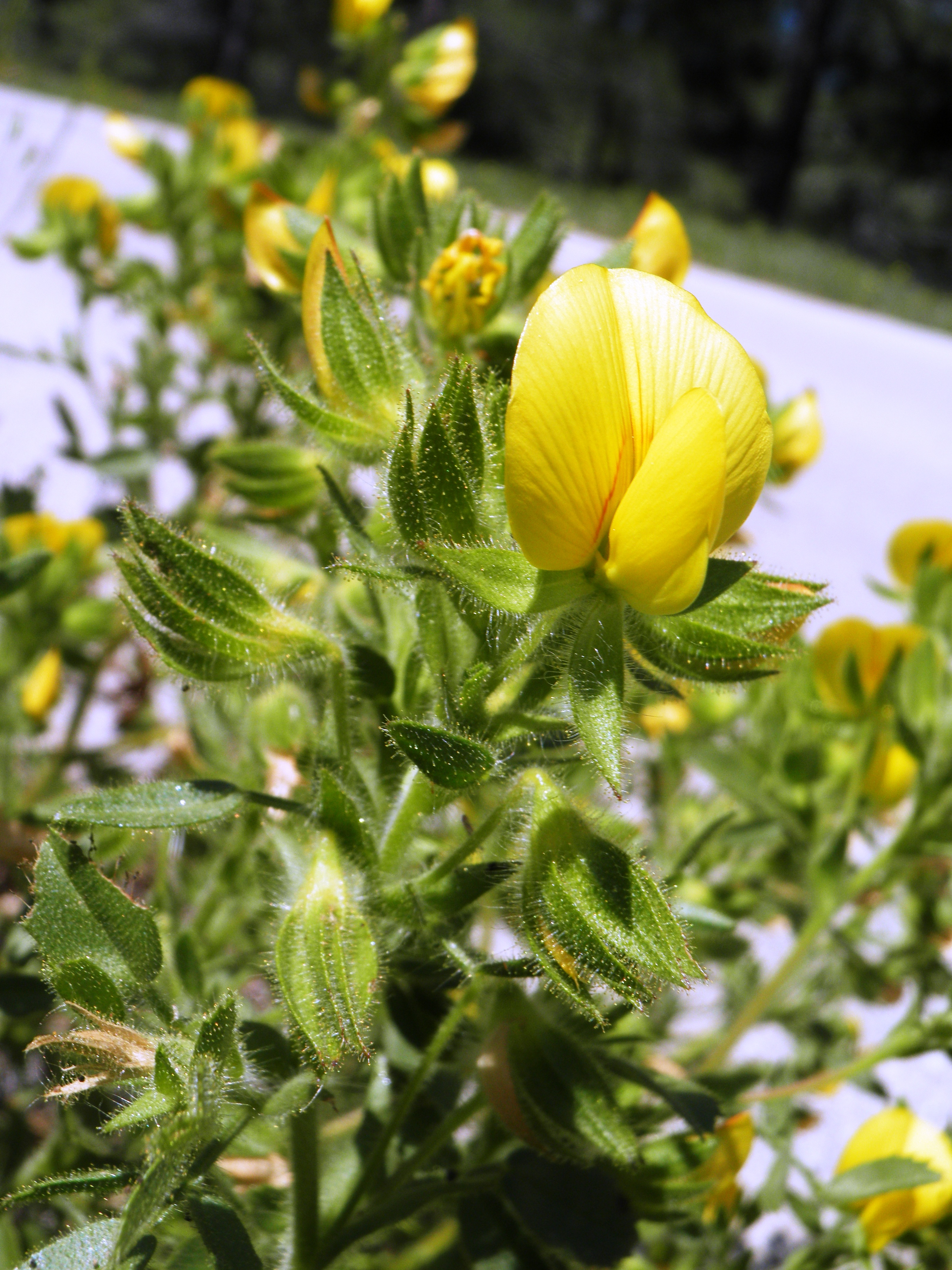 שברק דביק